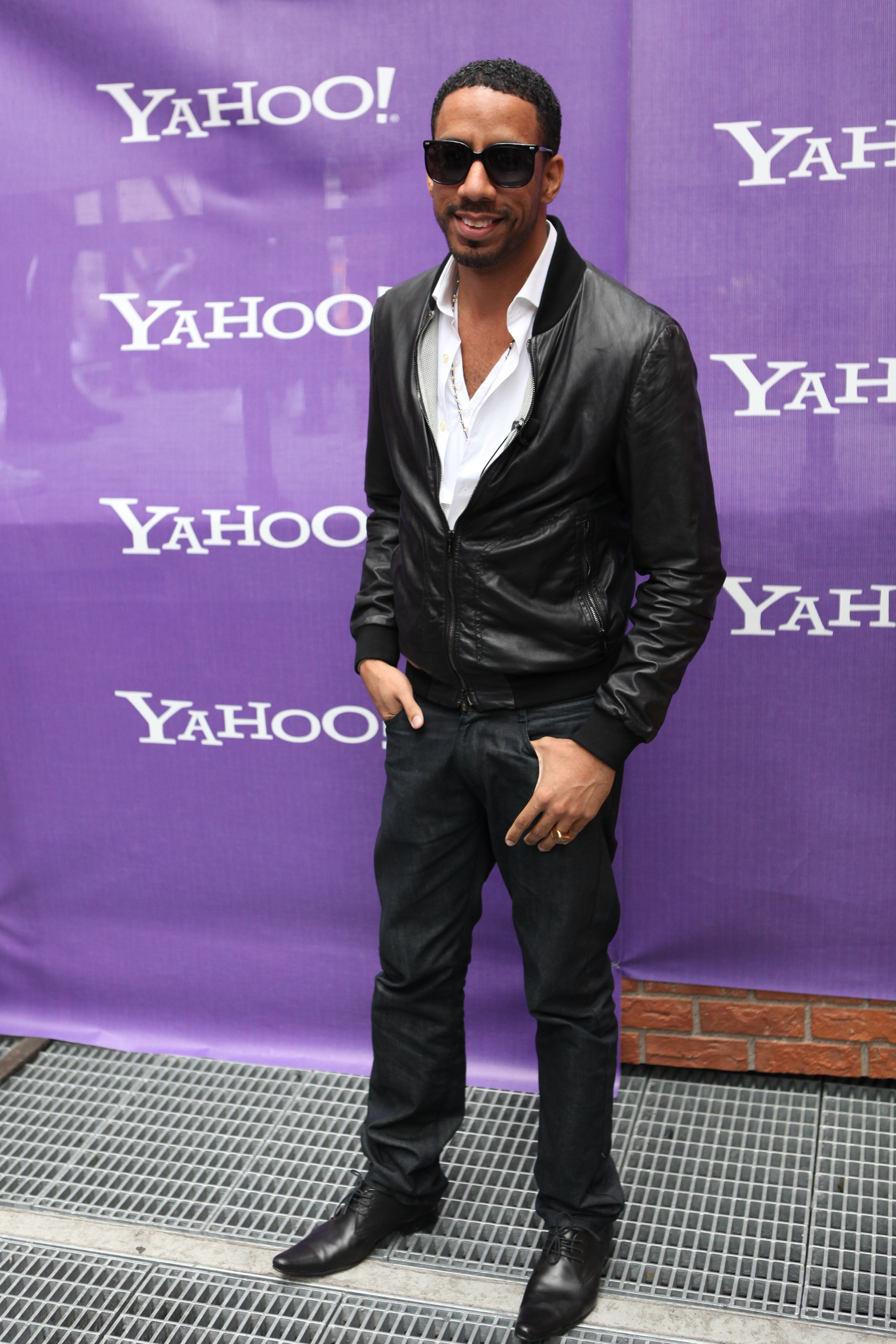 R&B sensation Ryan Leslie